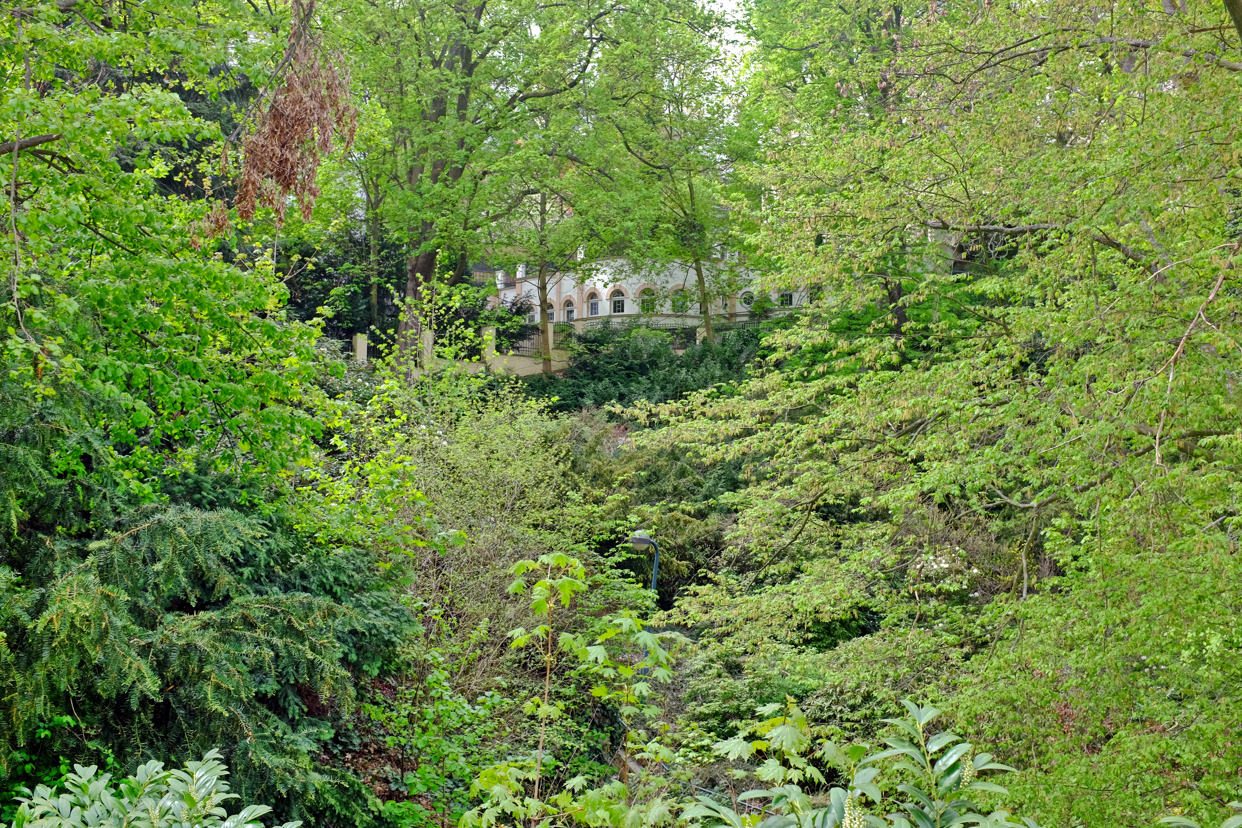 Karlovy Vary, Skalníkovy sady